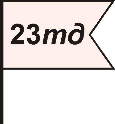 Іконка - прапор 23 танкової дивізії 8-ї танкової армії ЗС СРСР